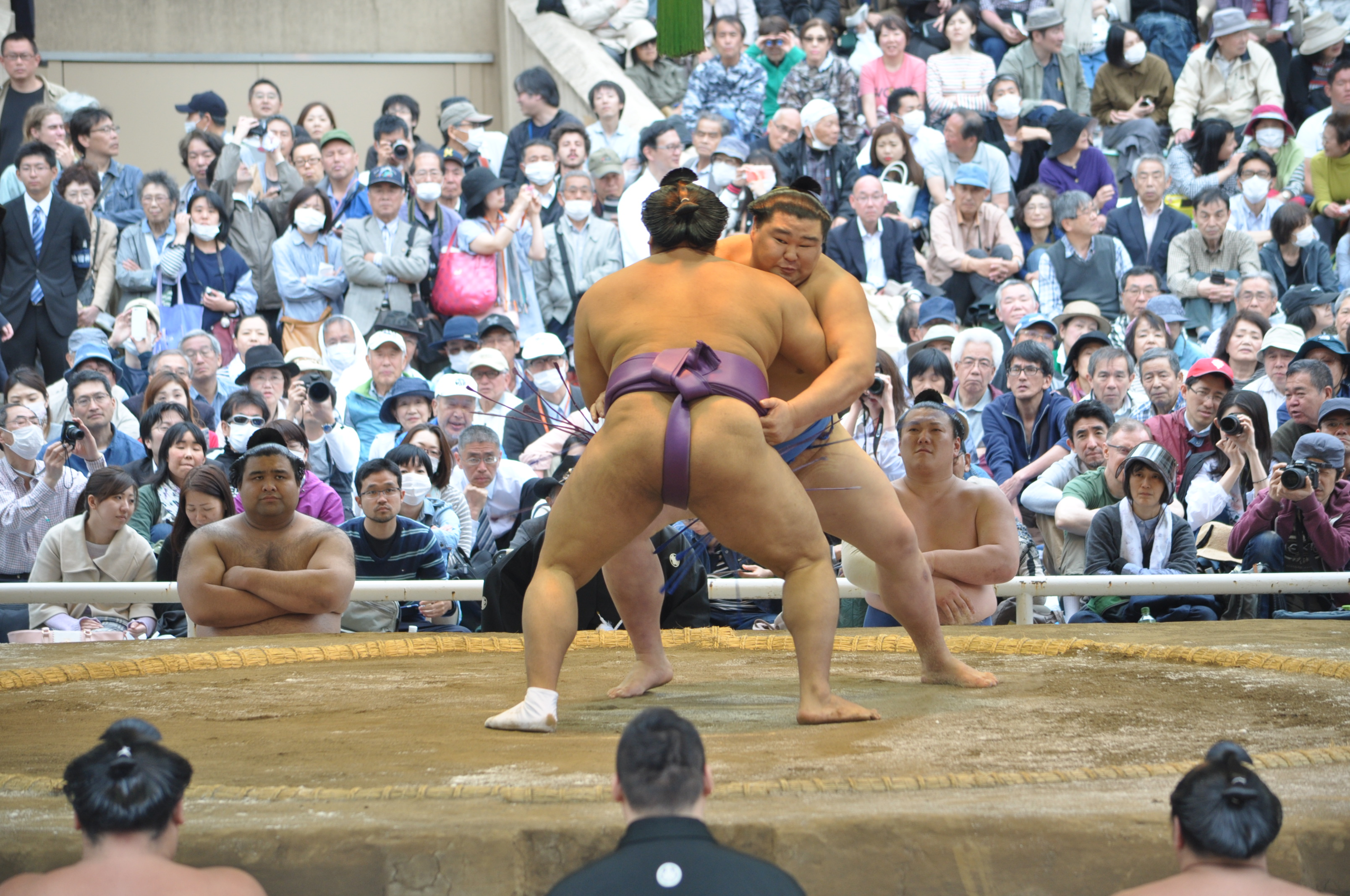 正代 直也